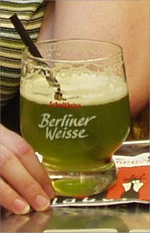 Berliner Weisse flavoured with Woodruff (Galium odaratum) Waldmeister Syrup